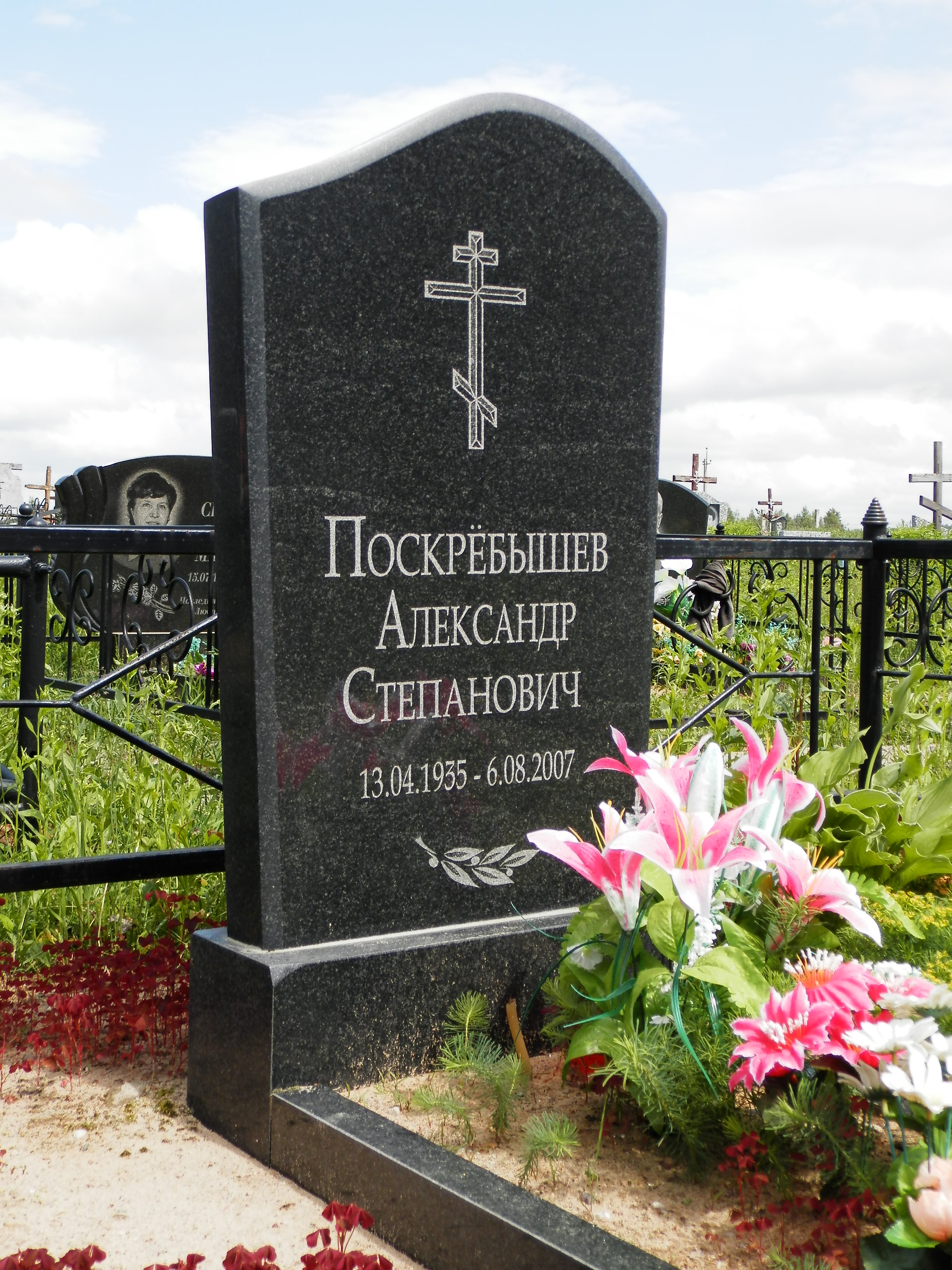 Могила белорусского детского писателя А.С. Поскребышева